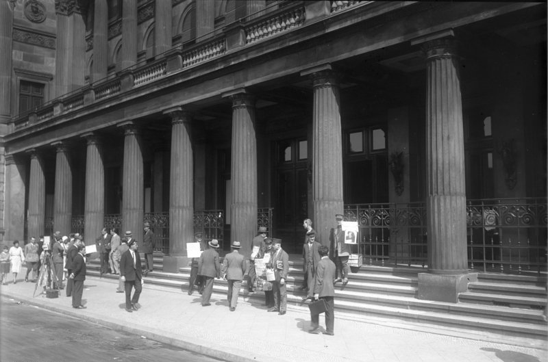 Die Börsen der großen Industrie-Länder sind die besten Barometer der Wirtschaftskrise ! Interessante Aufnahmen der Börsen von Amerika, England, Frankreich und Deutschland. Die Berliner Börse mit ihrem kaum wahrnehmbaren Leben, ein Zeichen der schweren Depression, die auf Deutschland lastet.